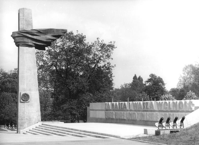 ADN-ZB-Kutscher-11.5.72-Berlin: Denkmal der deutsch-polnischen Freundschaft. Dieses Denkmal das den gemeinsamen Kampf polnischer Soldaten und deutscher Antifaschisten im II. Weltkrieg symolisiert wird in wenigen Tagen im Volkspark Friedrichshain der Hauptstadt feierlich der Öffentlichkeit übergeben.